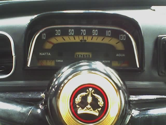 Tablero y Centro de Volante del Renault Dauphine fabricado en Argentina en la década de 1960. El panel de instrumentos es de industria argentina, marca EMETA, fabricado bajo licencia JAEGER.